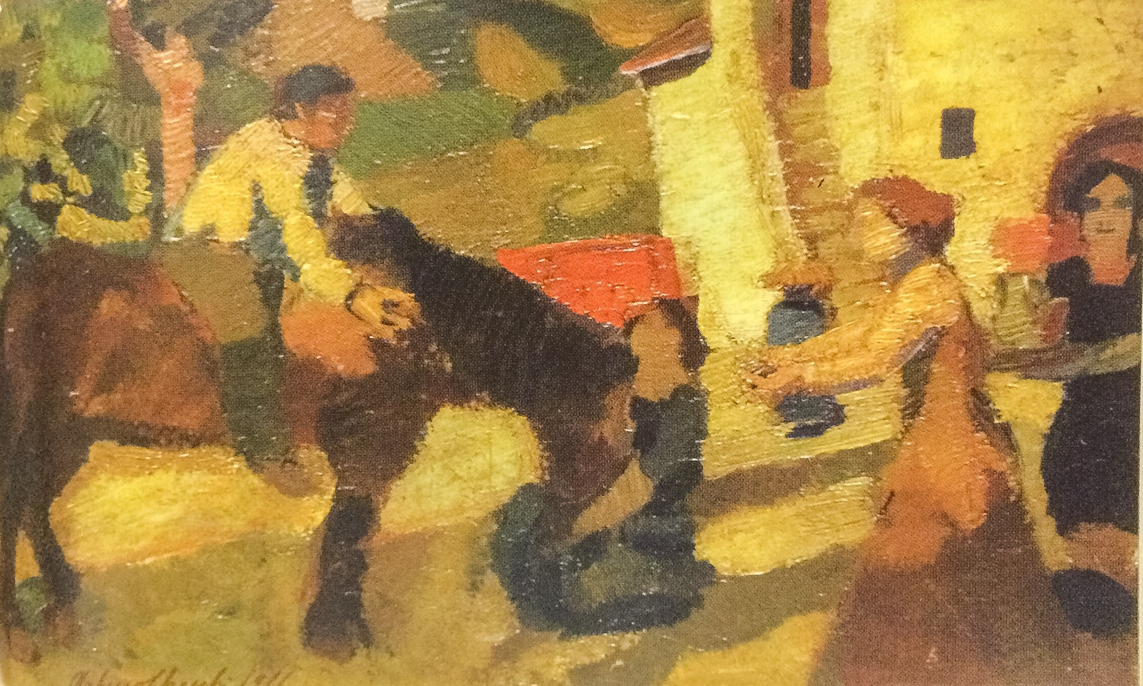 1911,Fondazione Montanelli Bassi